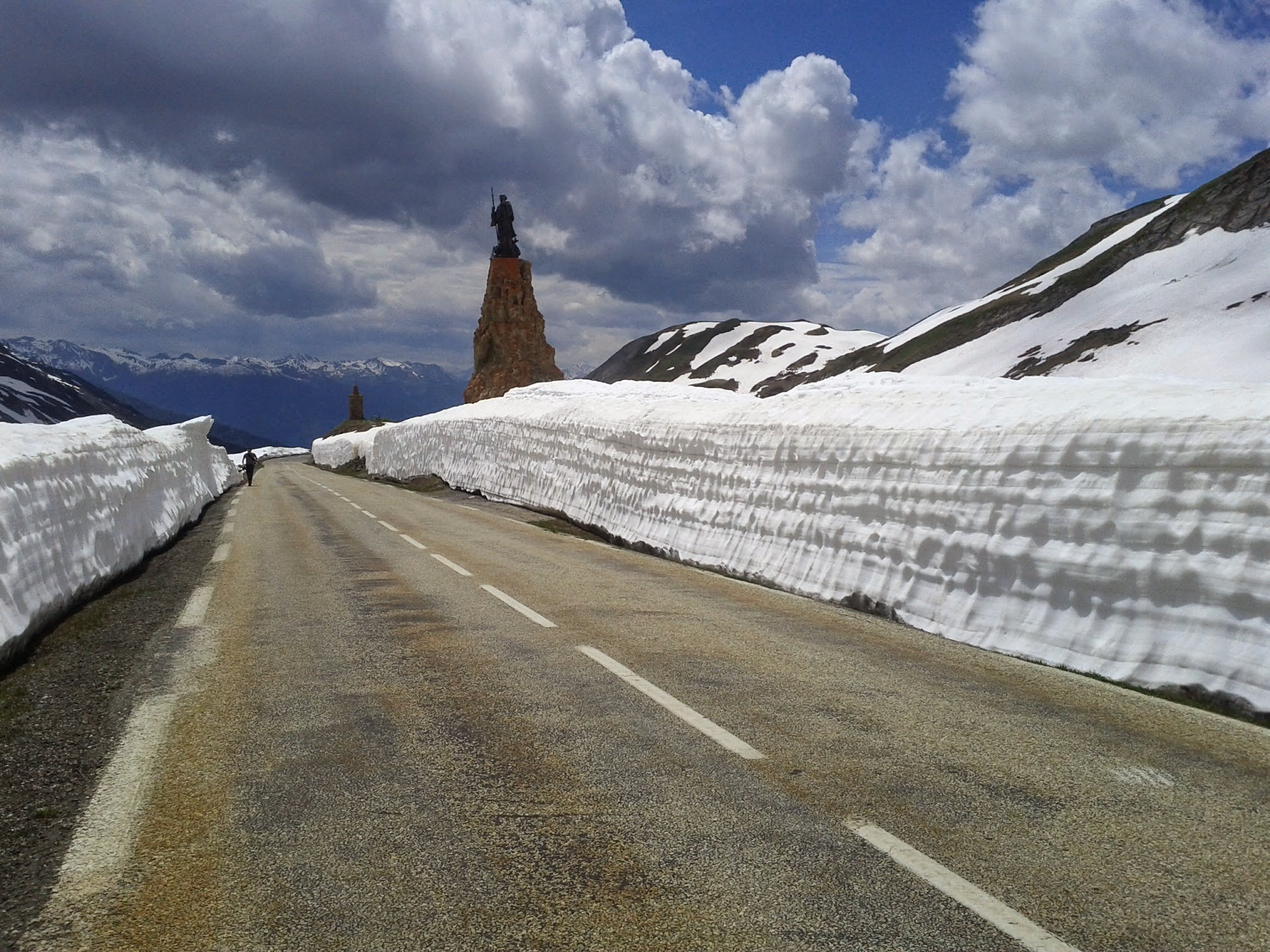 statue de Saint-Bernard